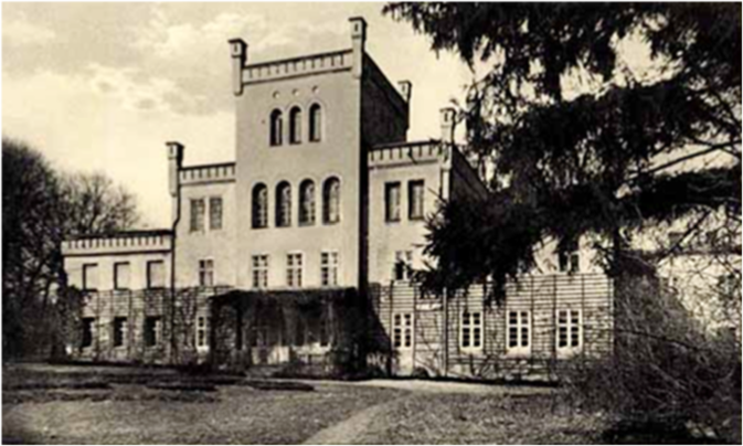 Eichendorffs Geburtsstätte Schloss Lubowitz bei Ratibor O/S.